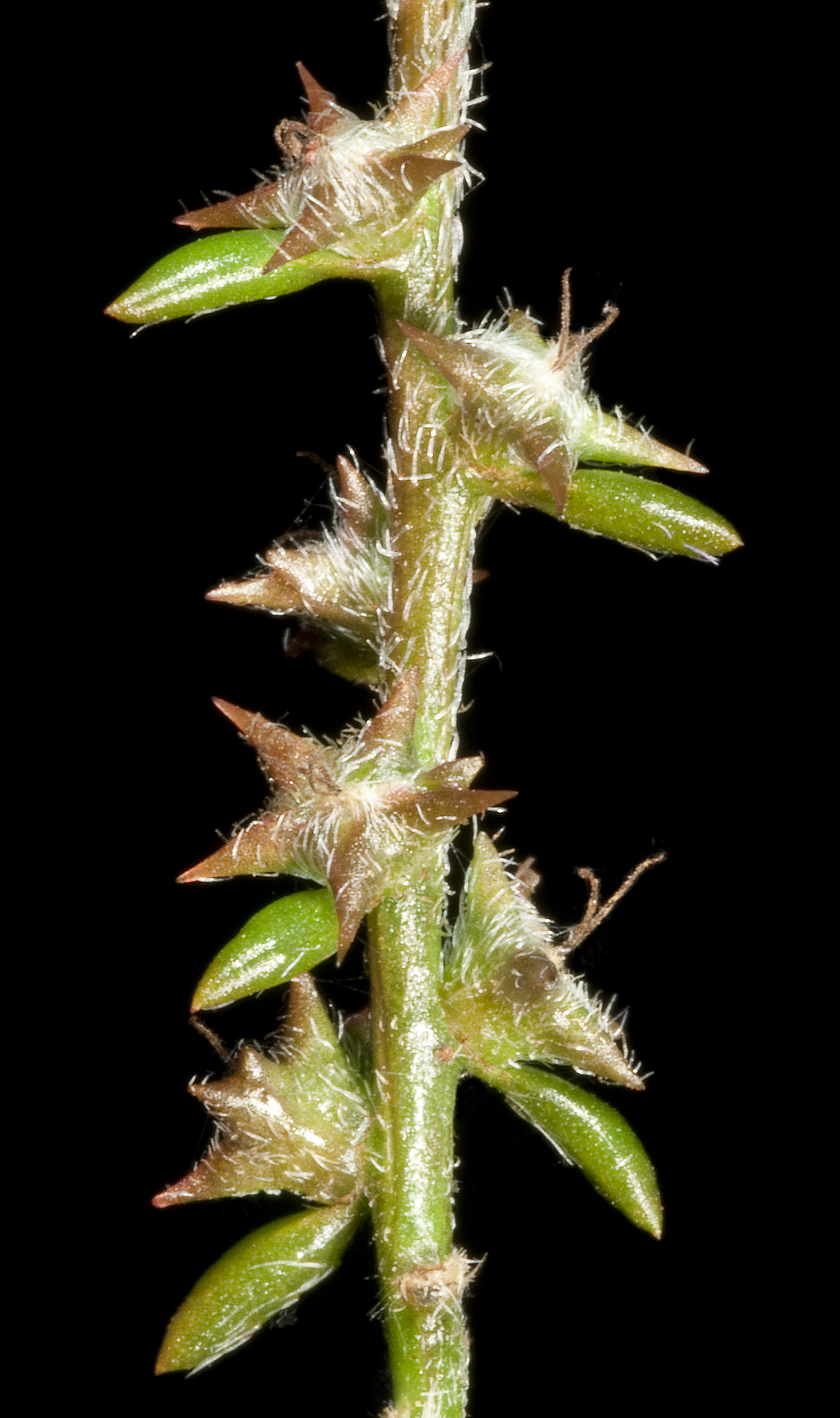 KRT4494 Western Australian Herbarium